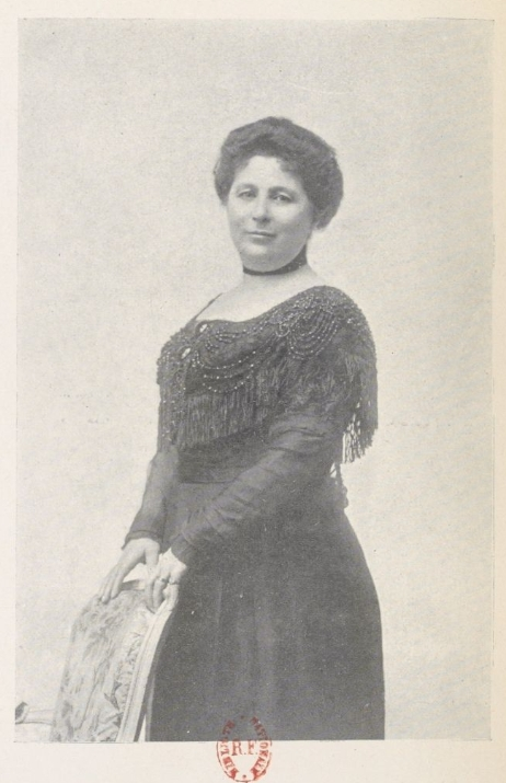 La Comtesse Desvernay, une des dirigeantes de la Ligue des femmes françaises